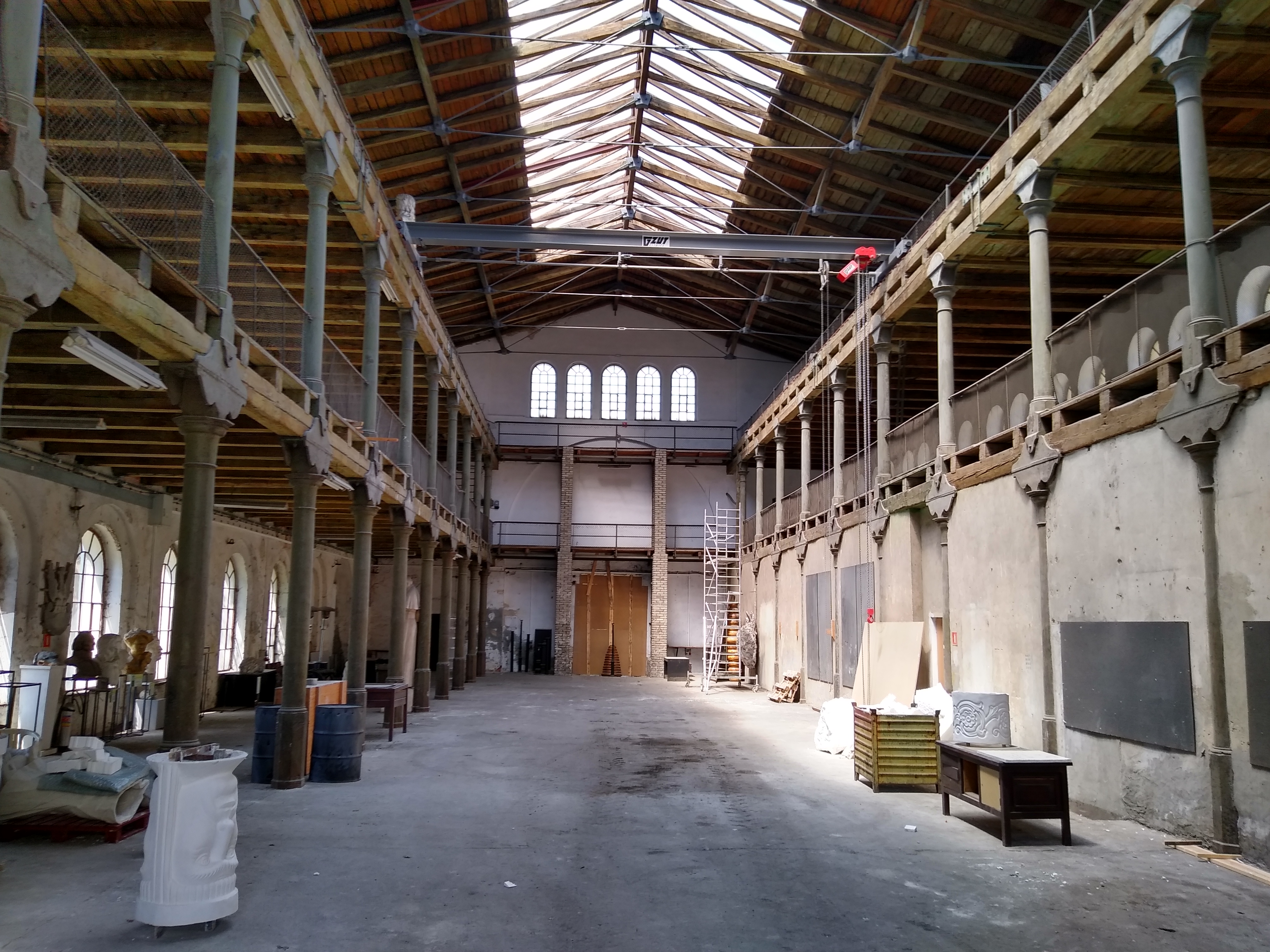 Hala Modeli GZUT - miejsce realizacji festiwalu.